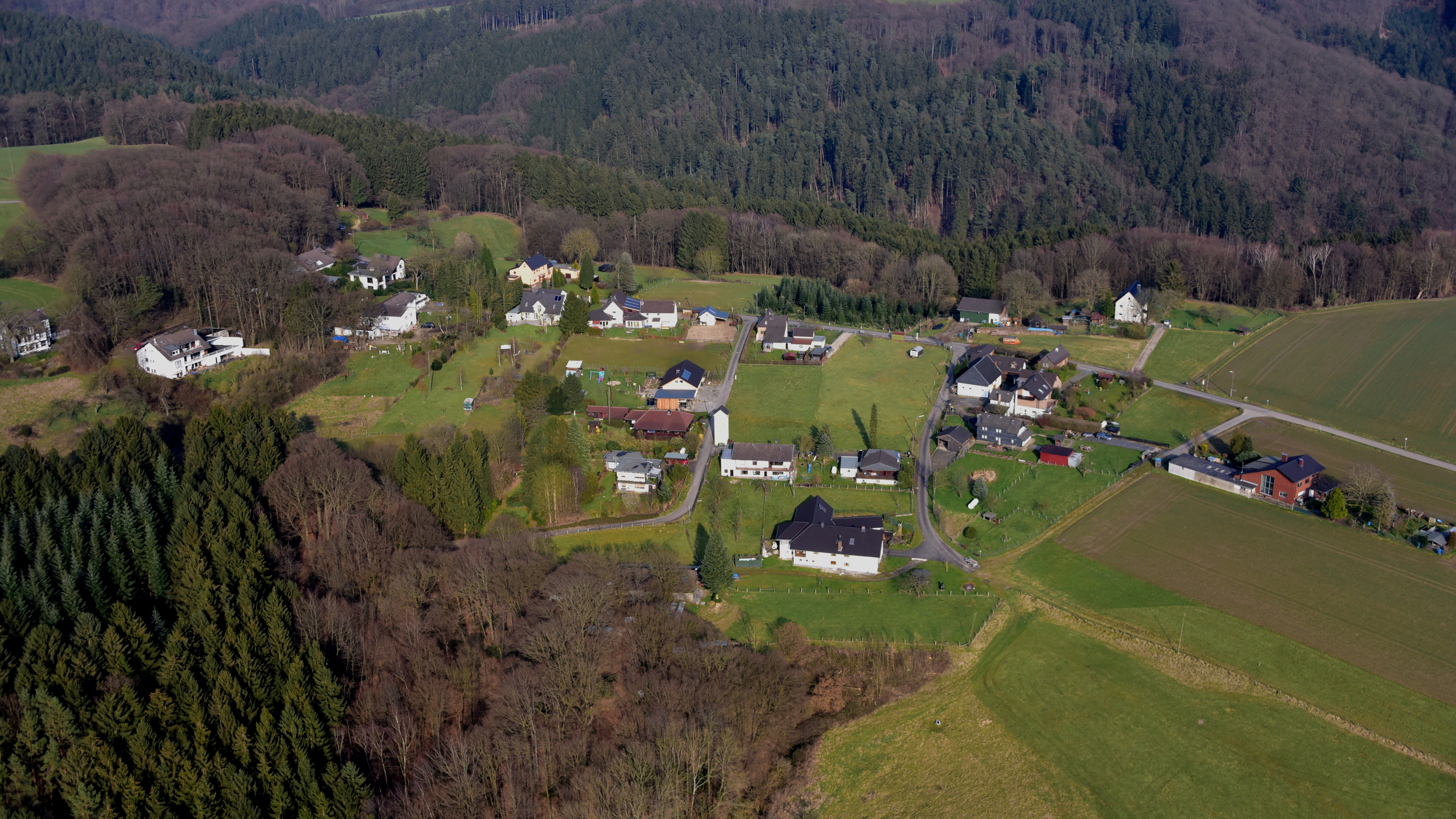 Niederhalberg, Stadt Hennef (Sieg): Luftaufnahme (2016)